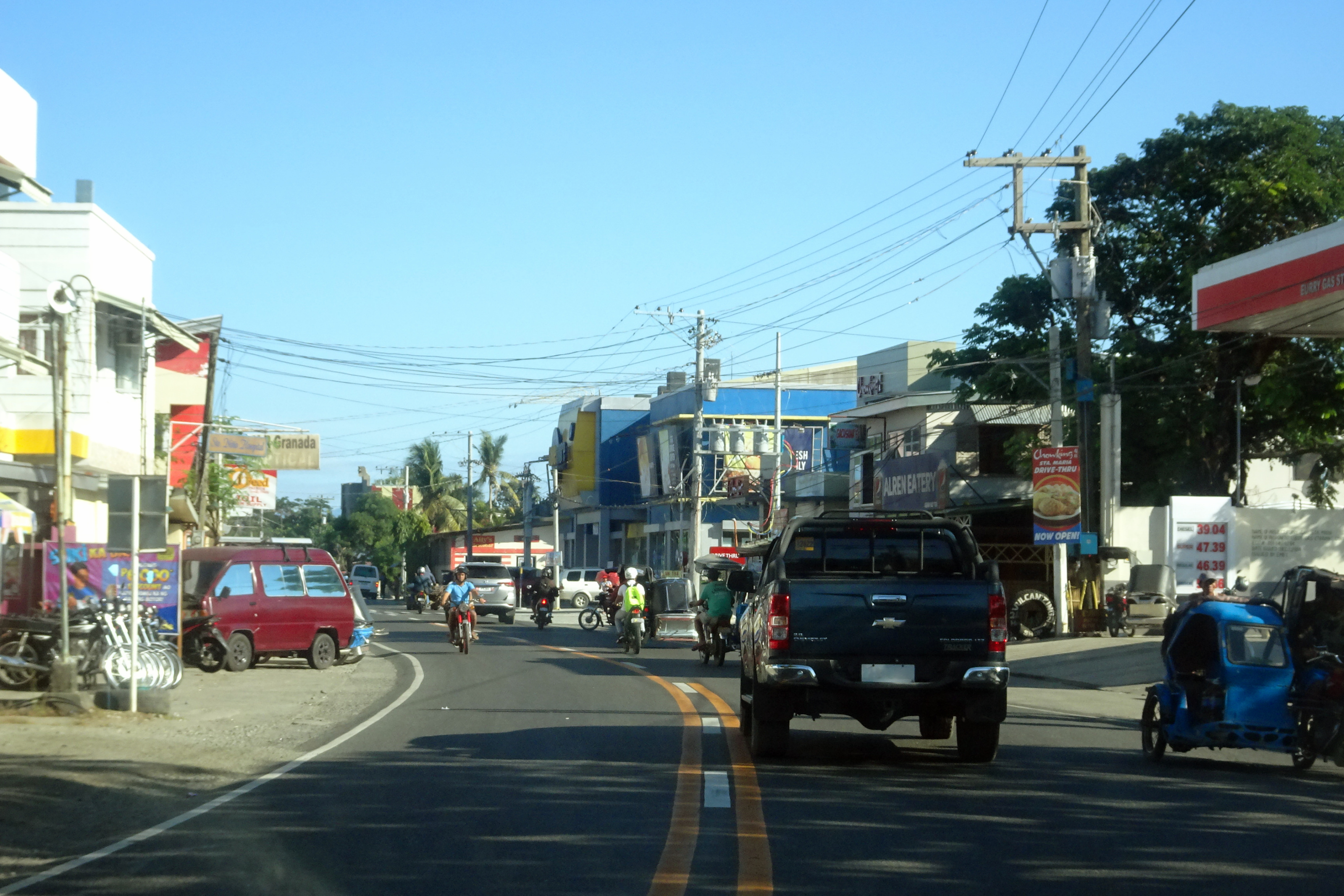 Santa Maria, Ilocos Sur, Philippines